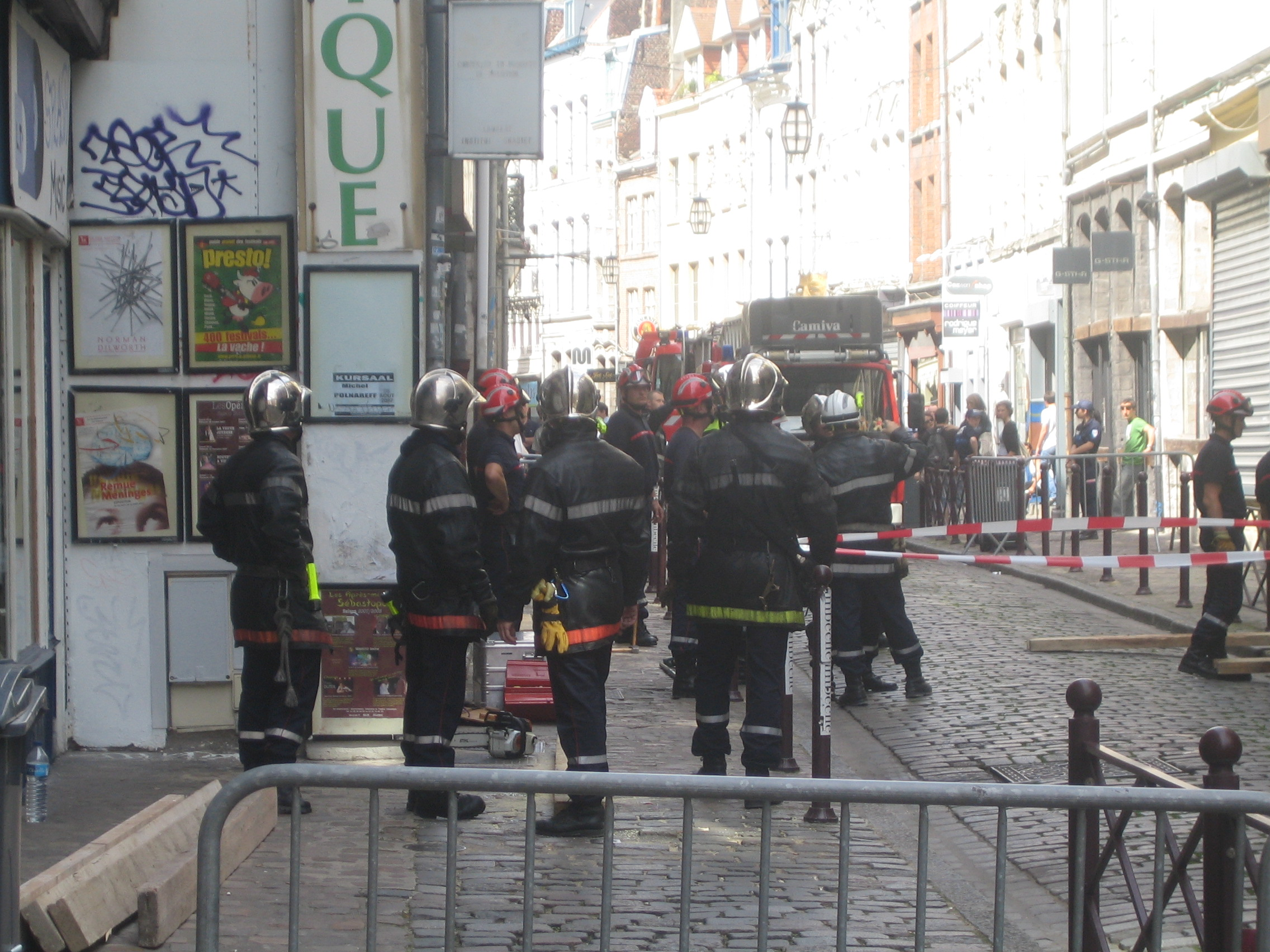 Pompiers dans la rue de la Clef à Lille